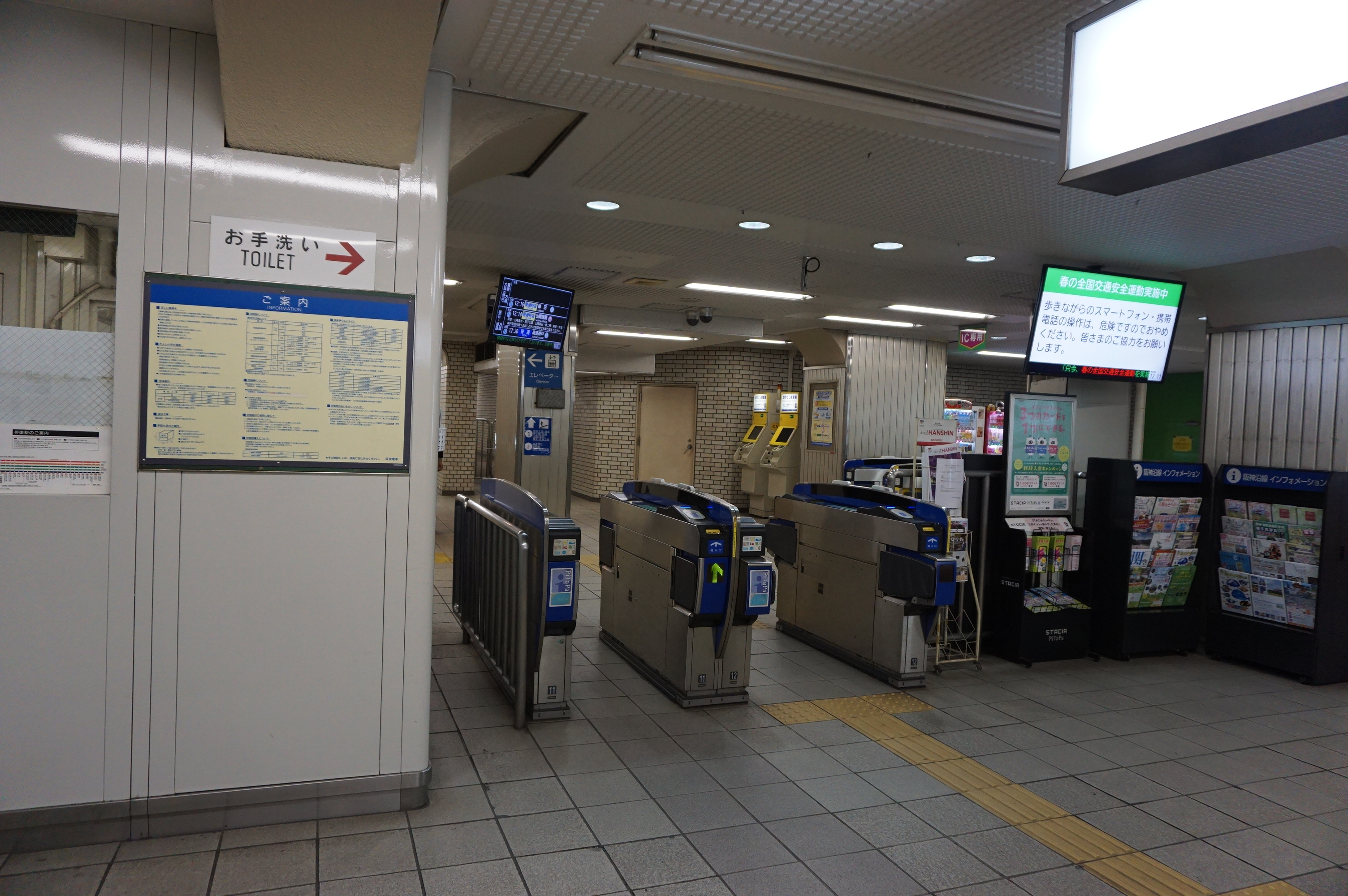 西改札口（2018年4月）